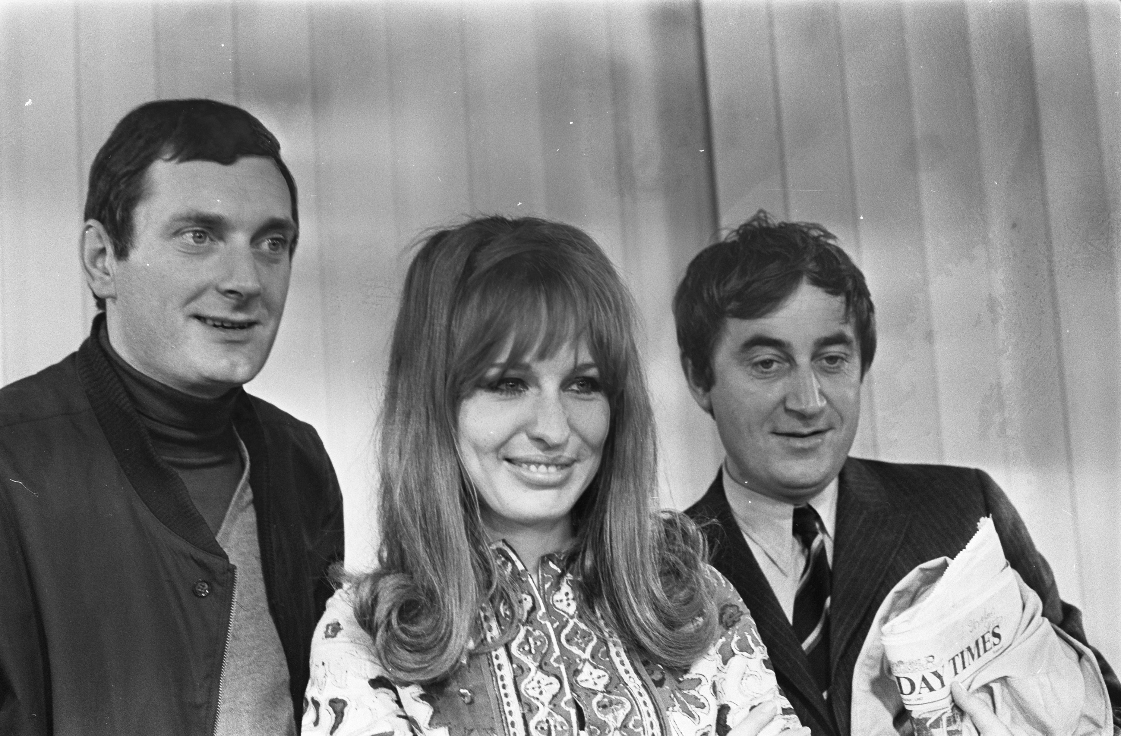 Liesbeth List naar Rio de Janeiro . Frans Myts (componist), Liesbeth List en Cees Nootenboom (tekst van liedje) 17 oktober 1967. Nooteboom heeft The Sunday Times in handen